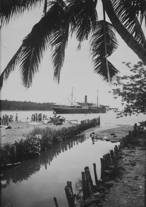 Foto. S.S. Van Heemskerk van de Koninklijke Paketvaart Maatschappij (KPM) voor anker bij Sanana